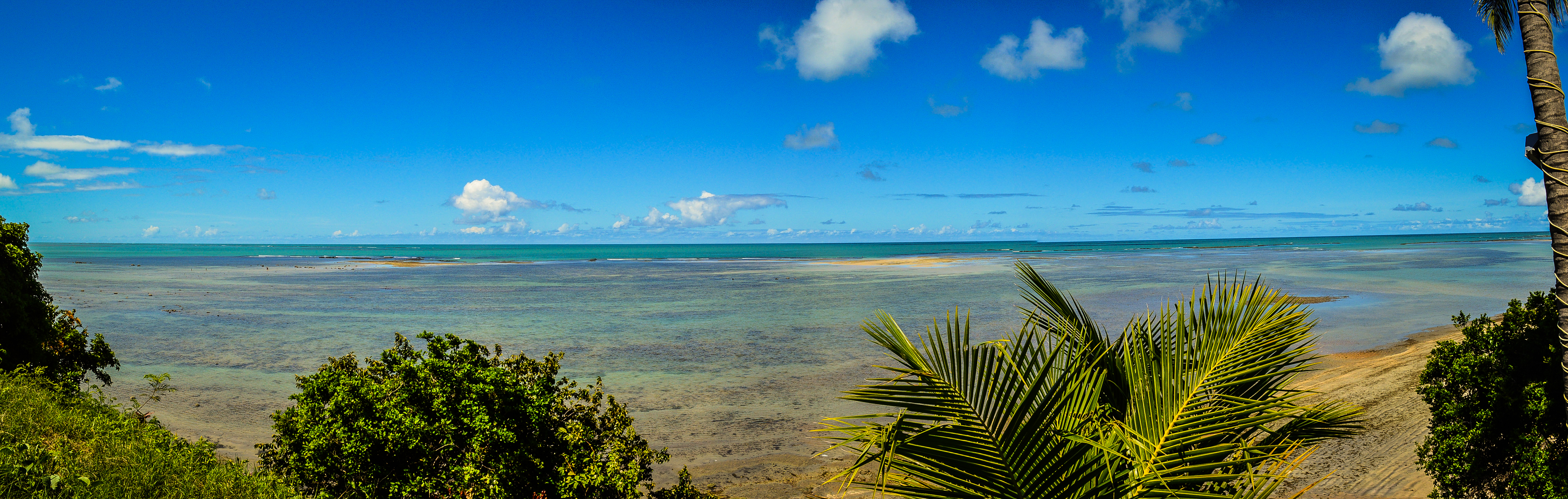 Mirante de Japaratinga